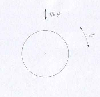 Fehér lapon egy kör rajza, , fölötte függőleges vonal, mindkét végén nyíllal, "1/3" felirattal, a kör mellette körív nyilakkal, "15 fok" felirattal